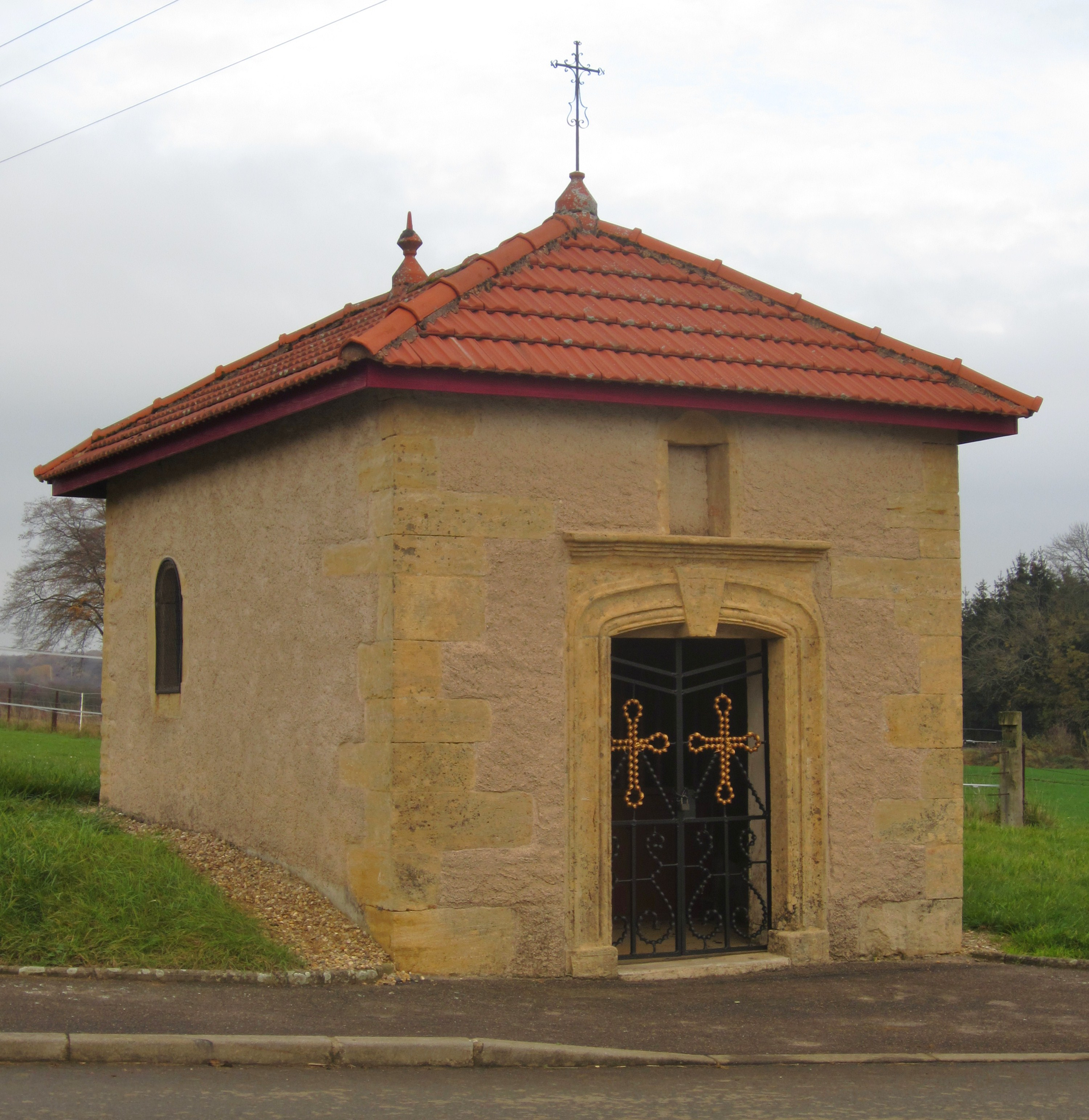 Description chapelle Mont Bonvillers chapelle Mont Bonvillers